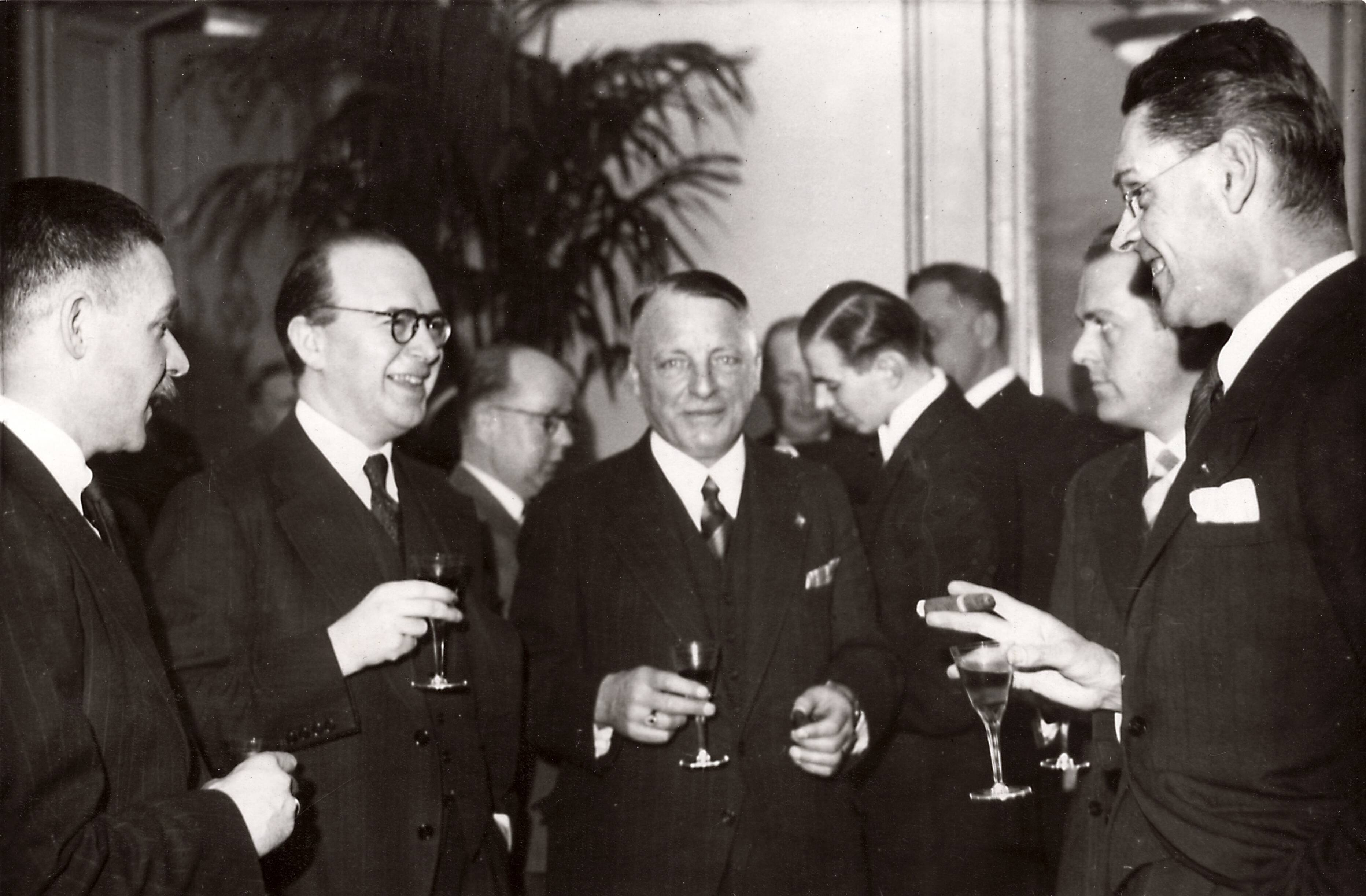 Tweede Wereldoorlog. Een bijeenkomst van belanghebbenden op het gebied van vreemdelingenverkeer. Aan de borrel Mr. J. Linthorst-Homan, Dr.H.M. Hirschfeld, oudminister L.N. Deckers en Dr. T. Goedewaagen. Nederland, Den Haag ('s-Gravenhage), 5 April 1941.